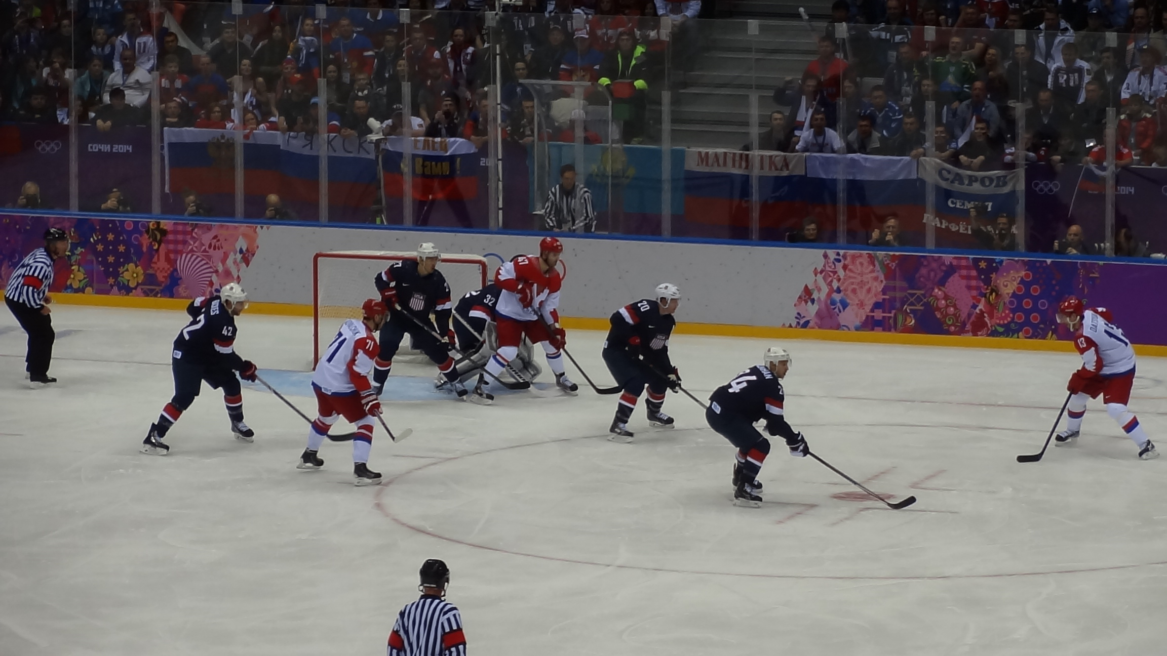 Сочи-2014. Хоккей. США – Россия